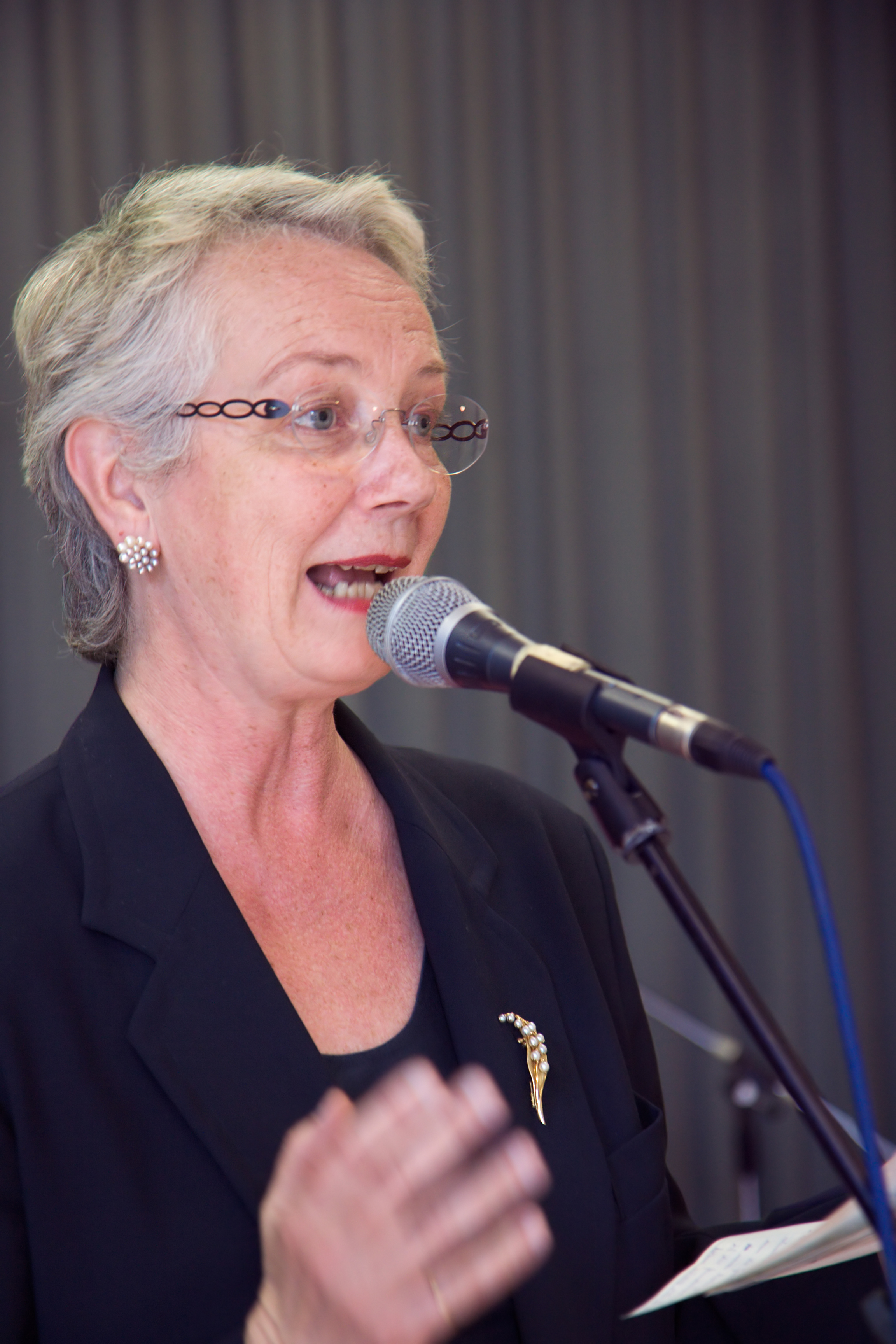 Monika Weber spricht im Kirchgemeindehaus der römisch-katholischen Kirche Oerlikon, Zürich, Schweiz.Ansprache im Rahmen eines Integrationsanlasses für Kosovoalbaner der Hilfsorganisation Caritas.